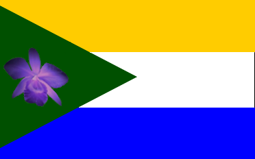 Bandera del municipio Francisco de Miranda, estado Táchira, Venezuela